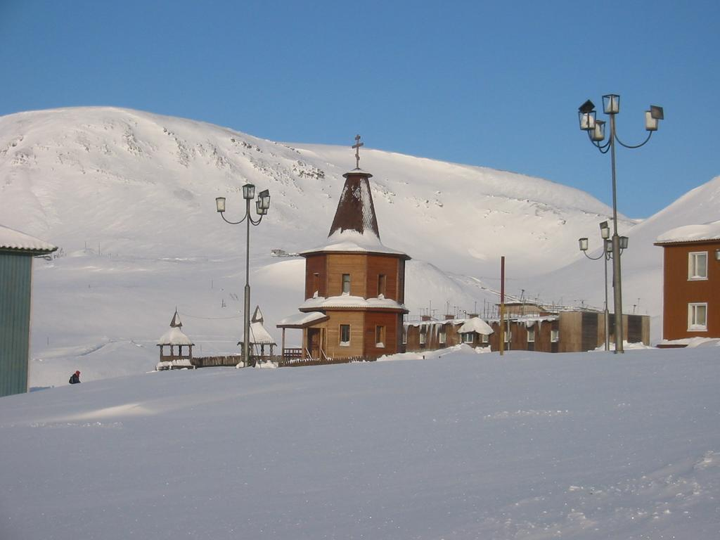 Barentsburg